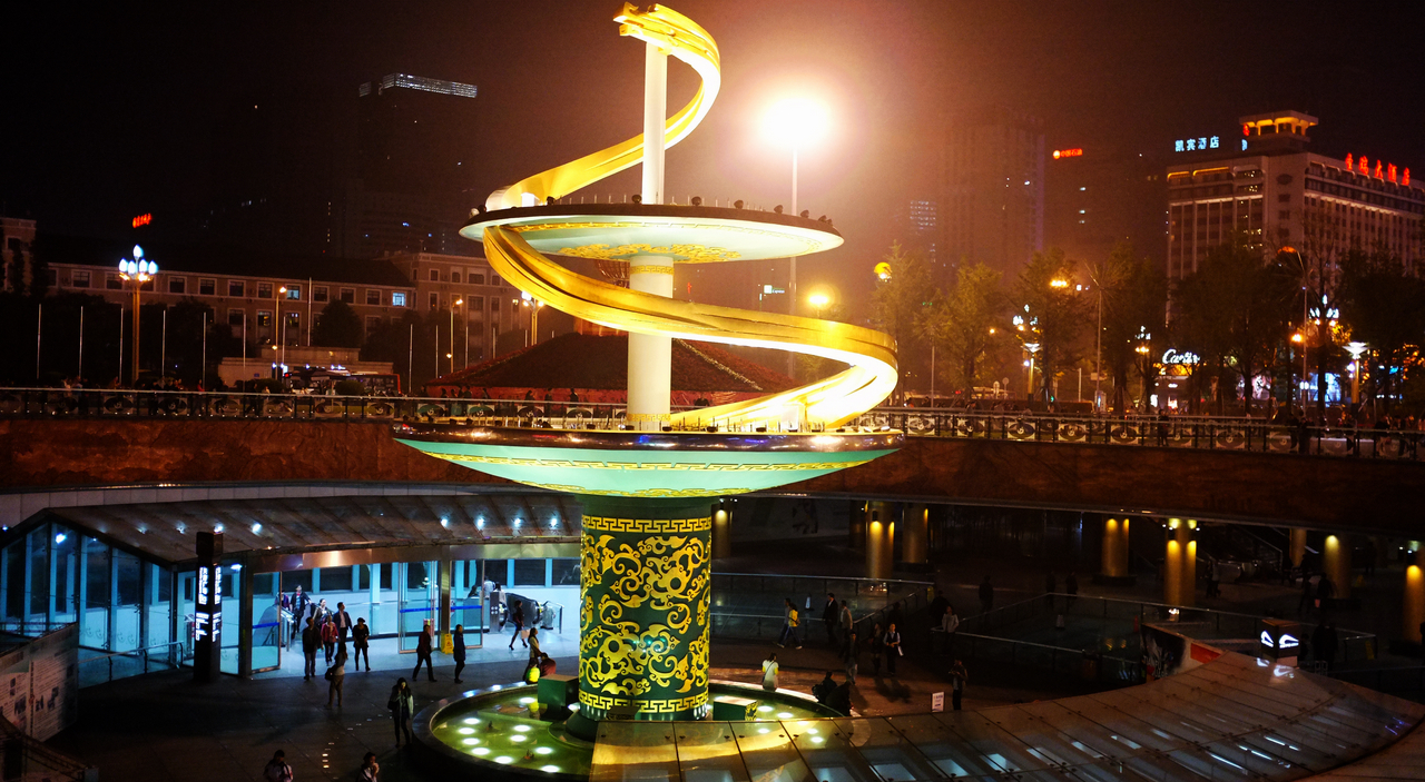 天府广场下沉广场.jpg